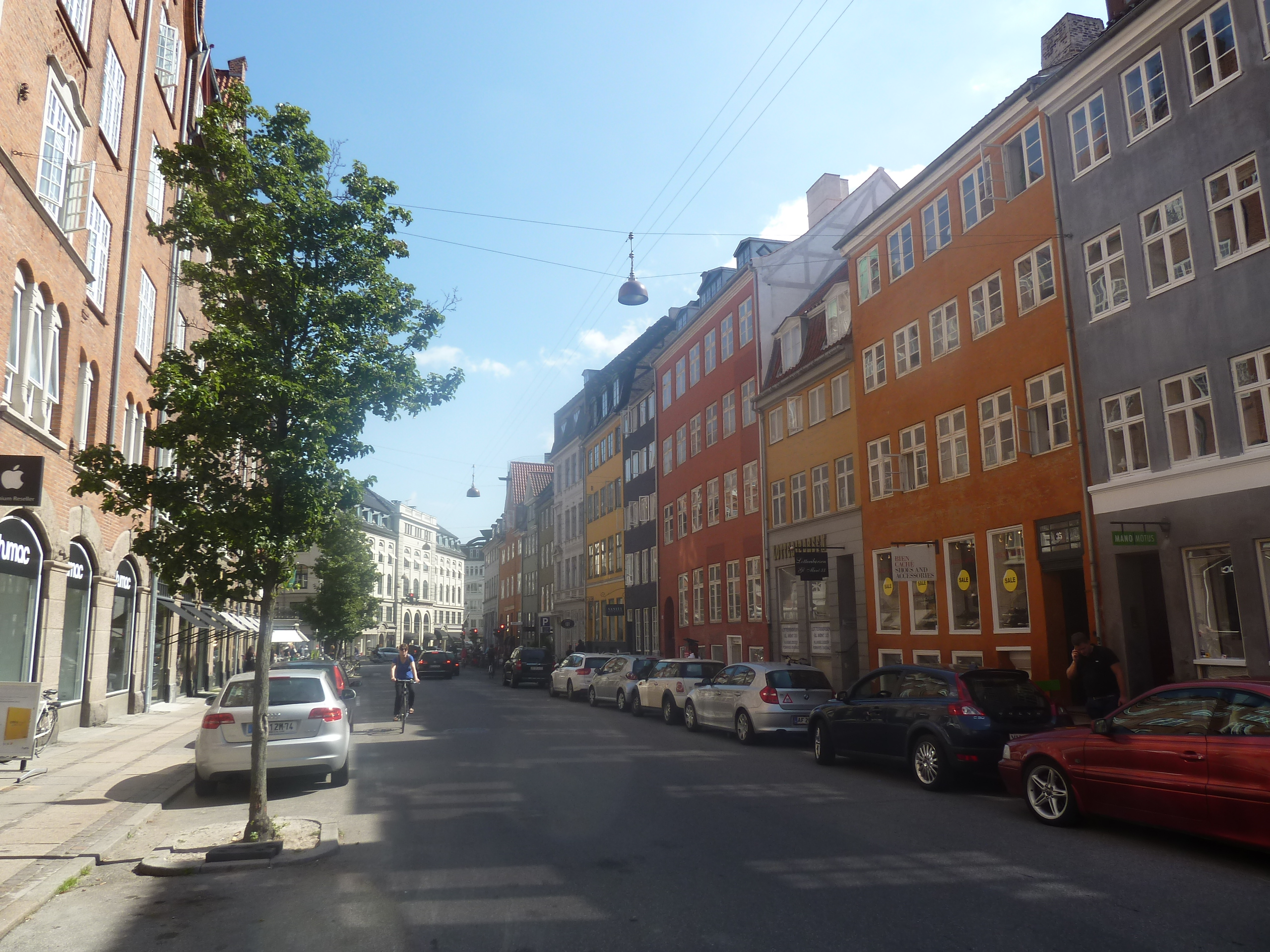 The street Gammel Mønt in Indre By in Copenhagen.